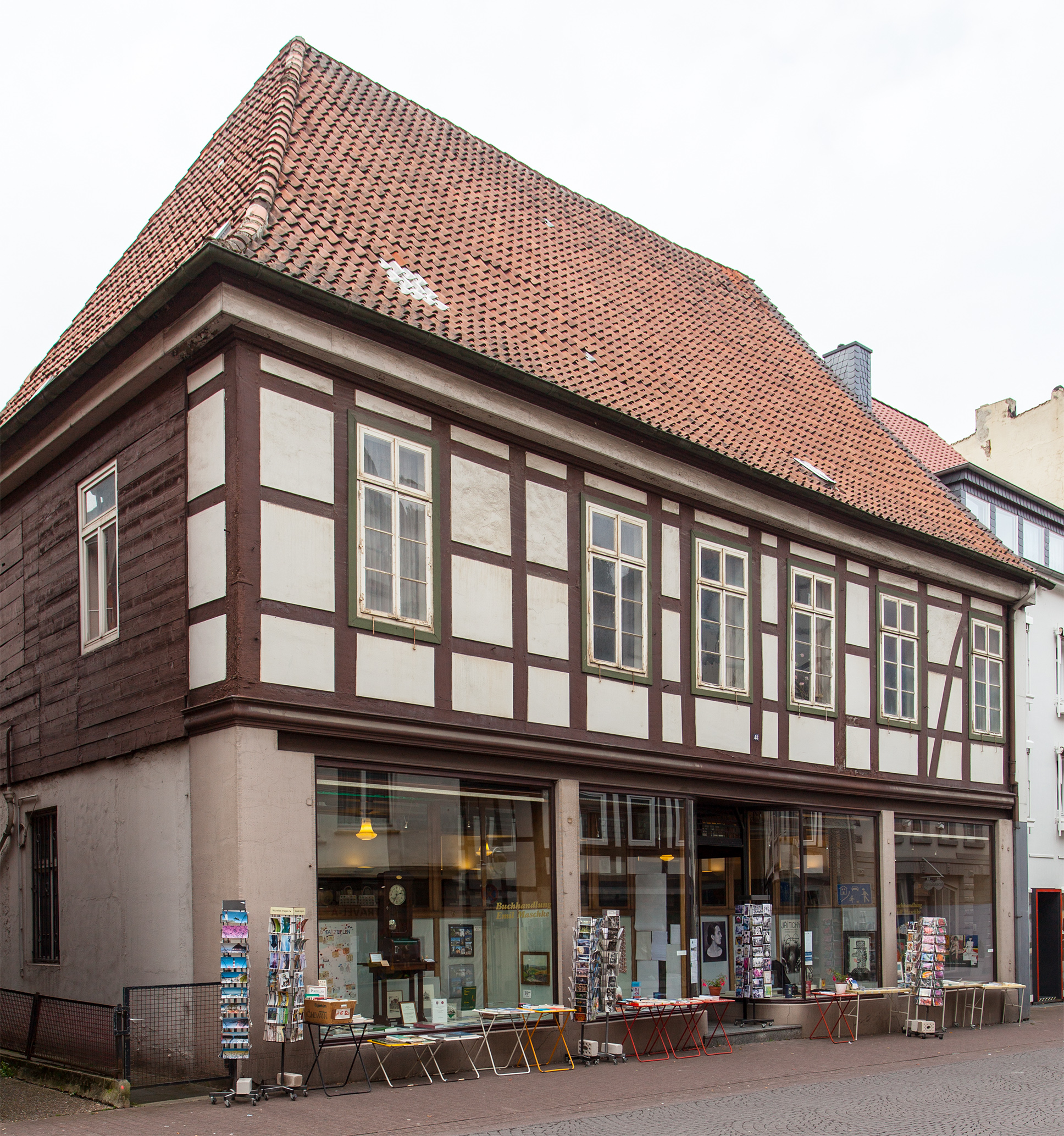 Bad Salzuflen, Osterstr. 48This is a photograph of an architectural monument.